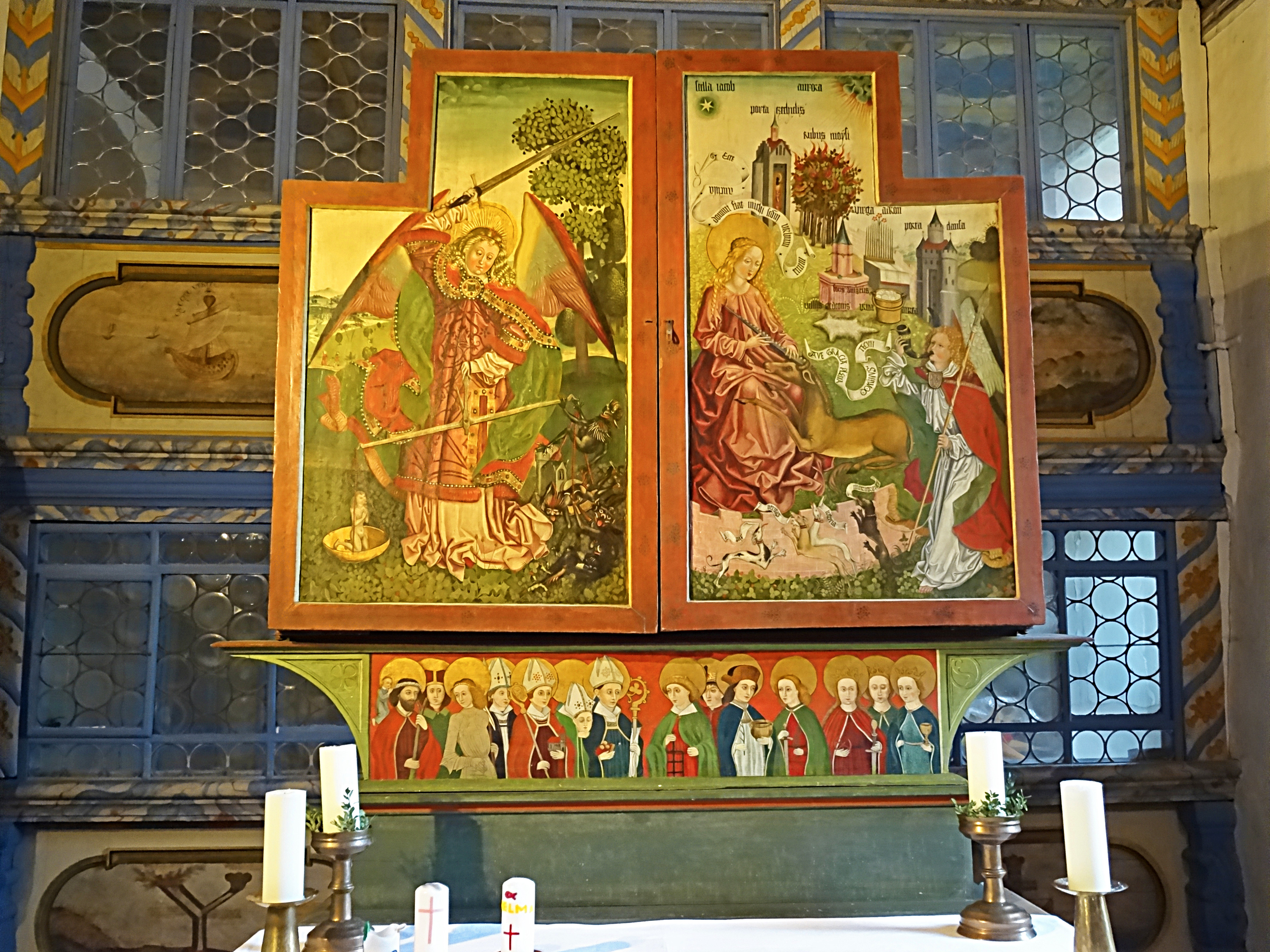 Spätgotischer Schnitzaltar in der Dorfkirche St. Michael (Großkochberg) aus Saalfelder Schule von 1490. Auf den Flügelaußenseiten links: der Hl. Michael als Seelen-Wäger, rechts die Einhorn-Verkündigung. Die Predella zeigt die Vierzehn Nothelfer.